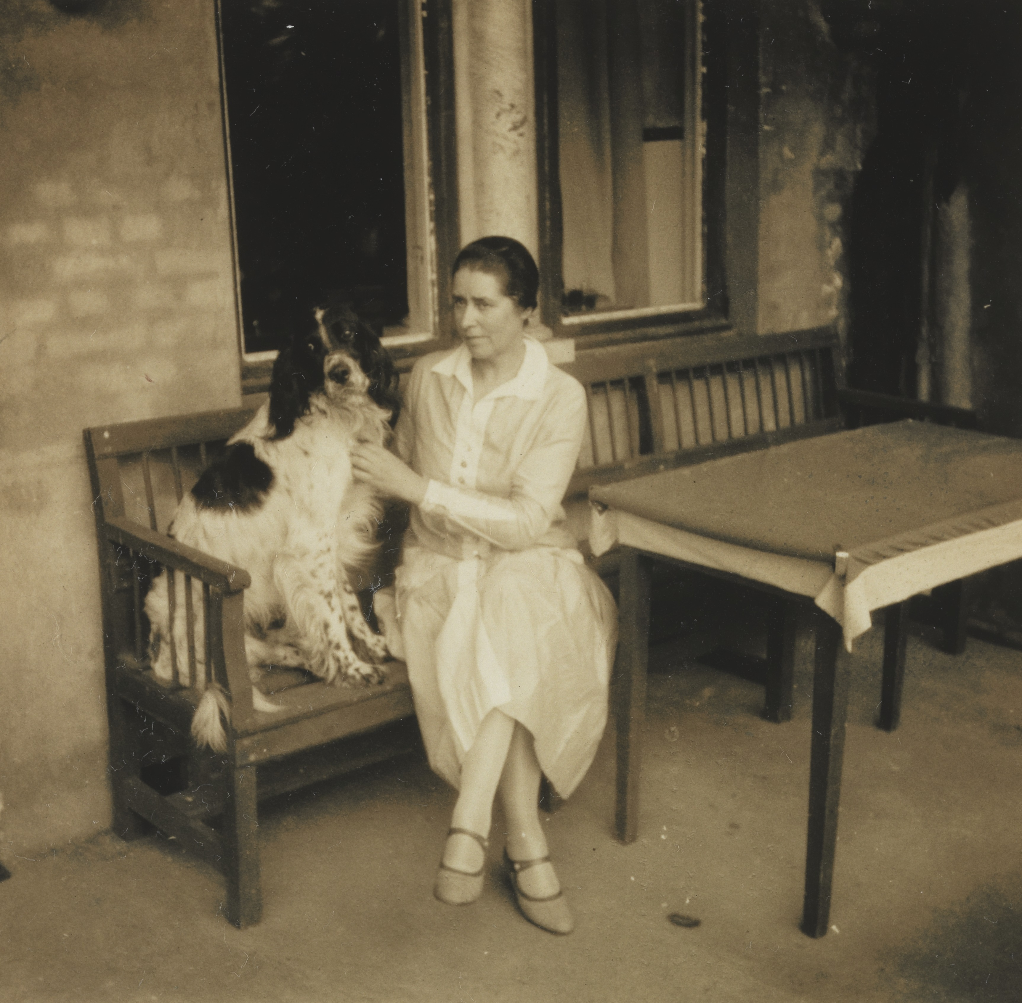 Sigrun Nansen med hunden sin på terrassen på Polhøgda. Depicted person: Nansen, Sigrun (1869-1957); født Sandberg; gift første gang Munthe Depicted place: Akershus, Bærum